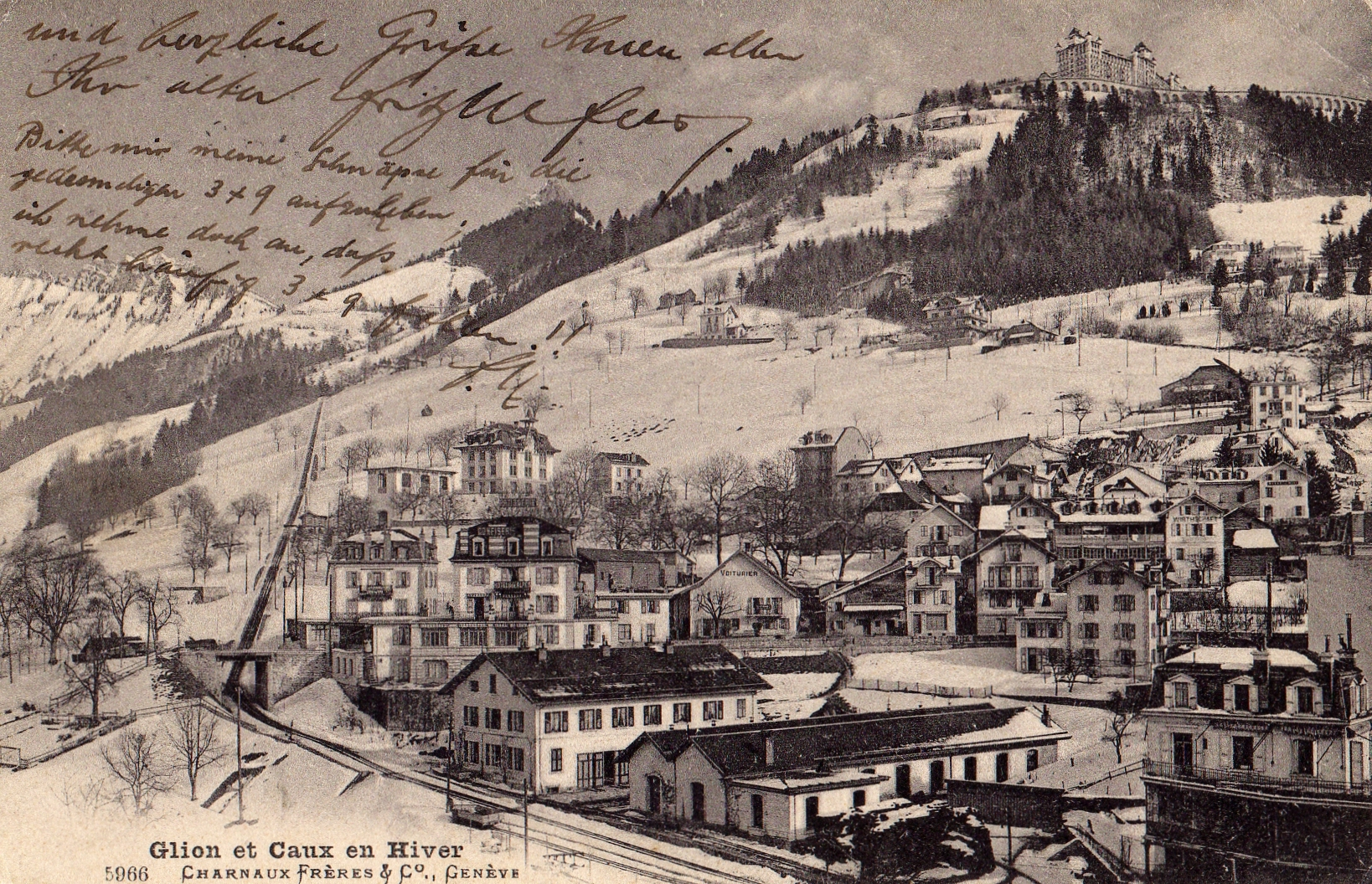 Postcard from Glion et Caux en Hiver